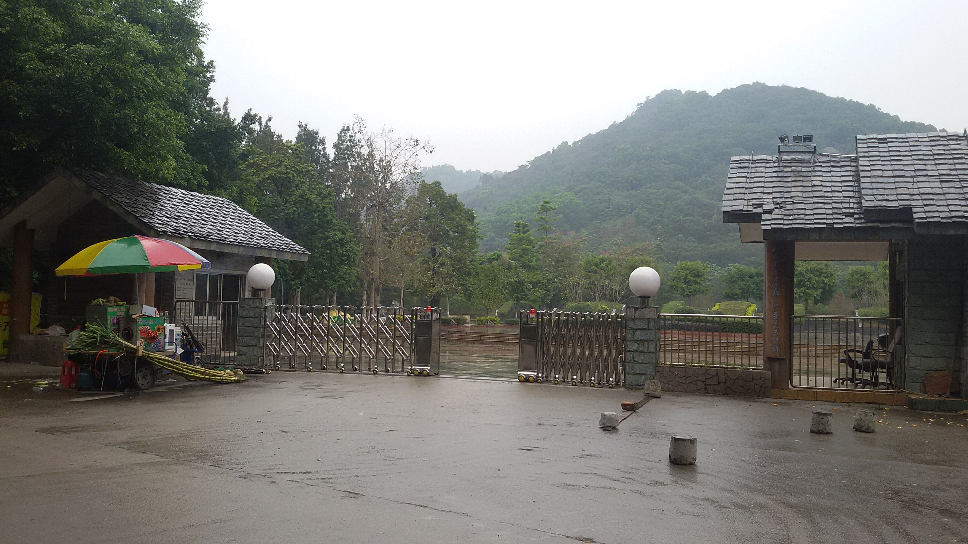 粵語: 龍頭山森林公園正門